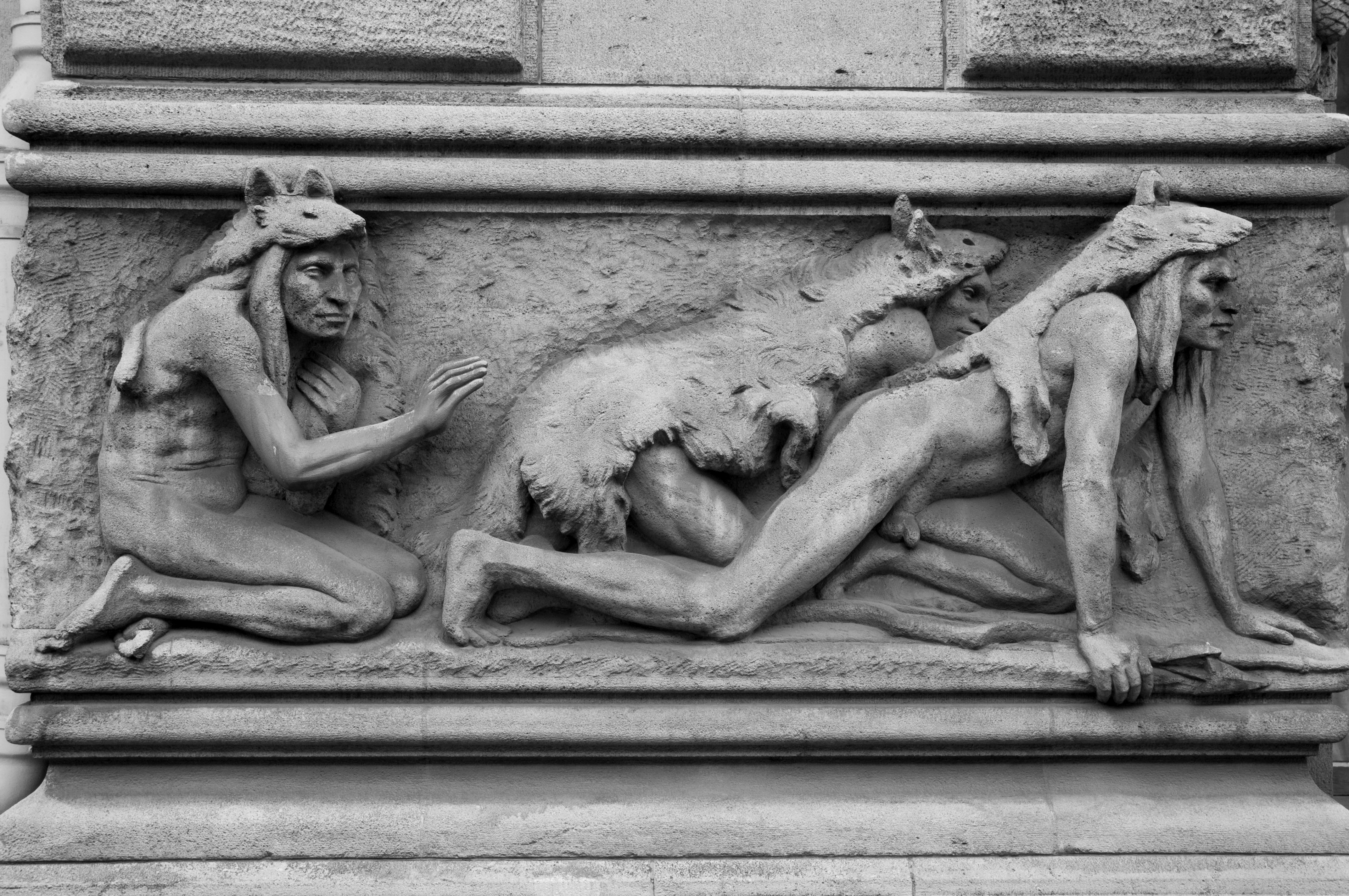 Détail d'une frise du bâtiment, Institut de Paléontologie Humaine, sculpteur Constant Ambroise Roux (1869-1942)